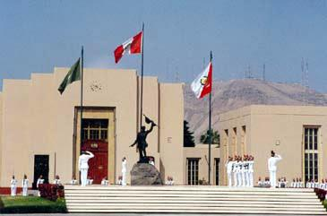 Plaza de la Escuela Militar de Chorrillos